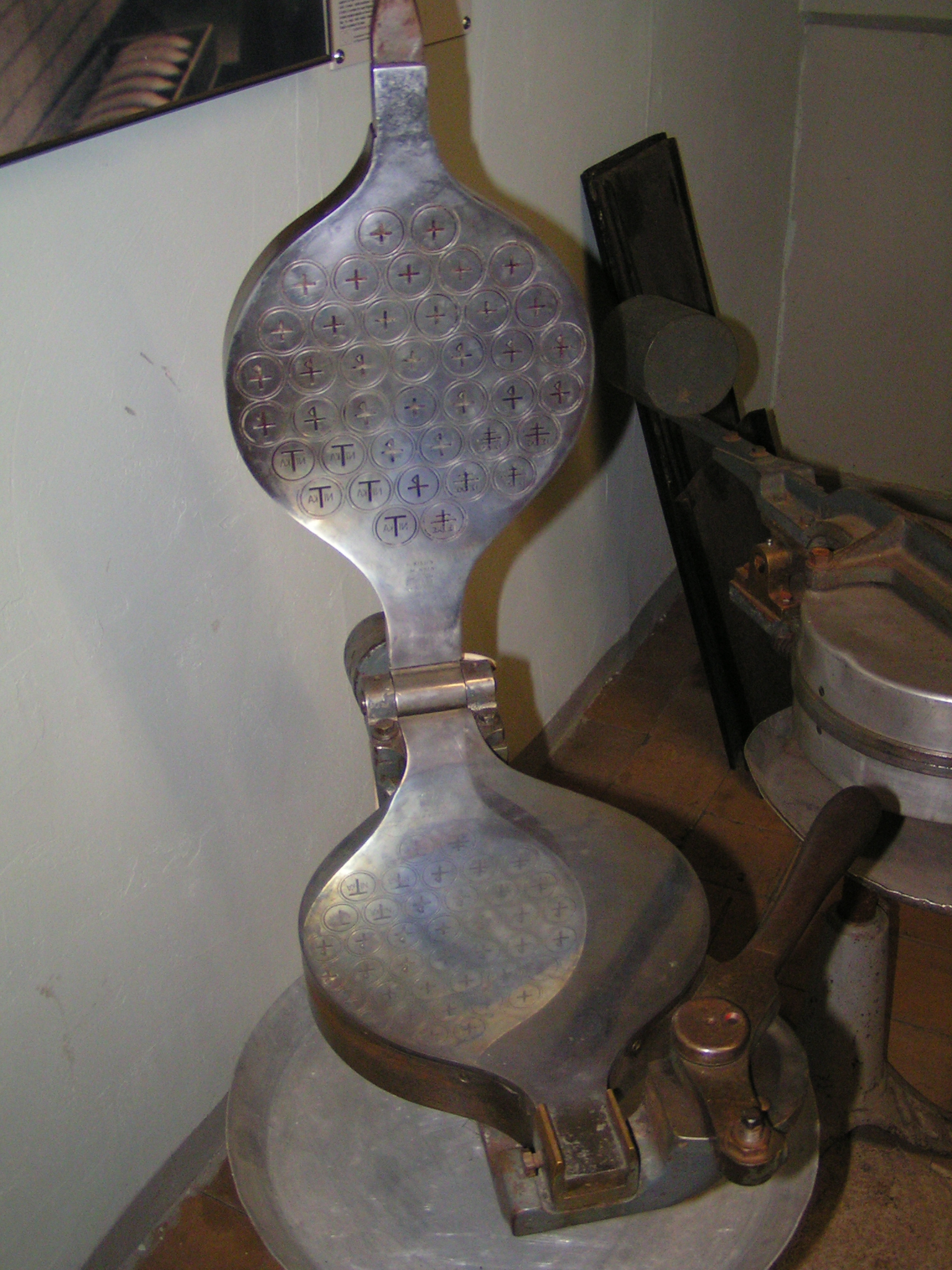 Oblateneisen auf dem Roscheider Hof bei Konz (1. August 2004)